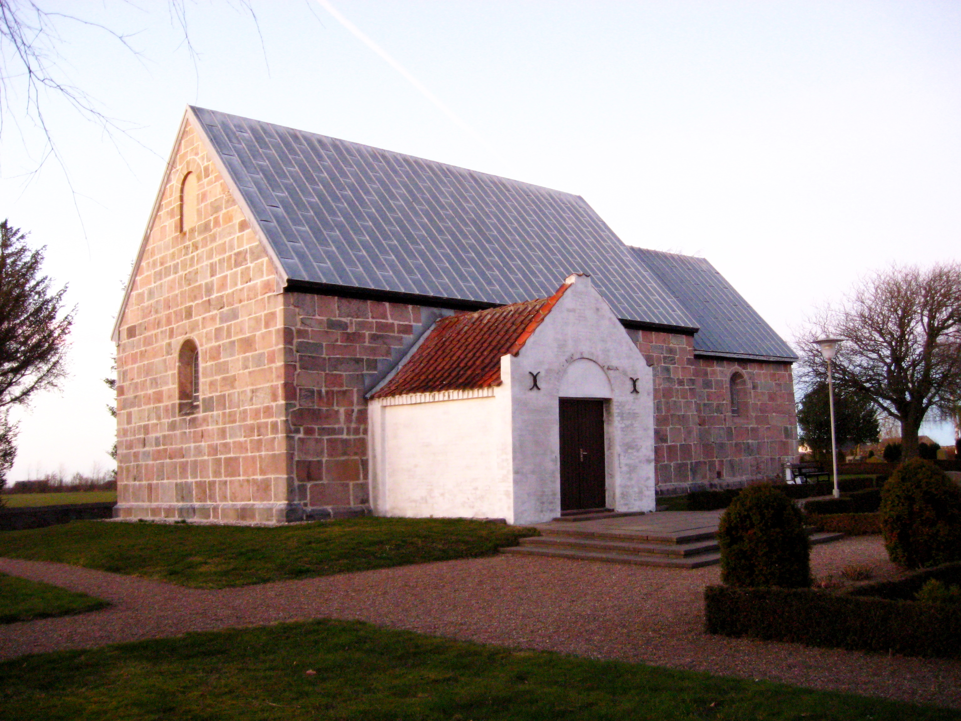 Sejlstrup Kirke, Hjørring Kommune